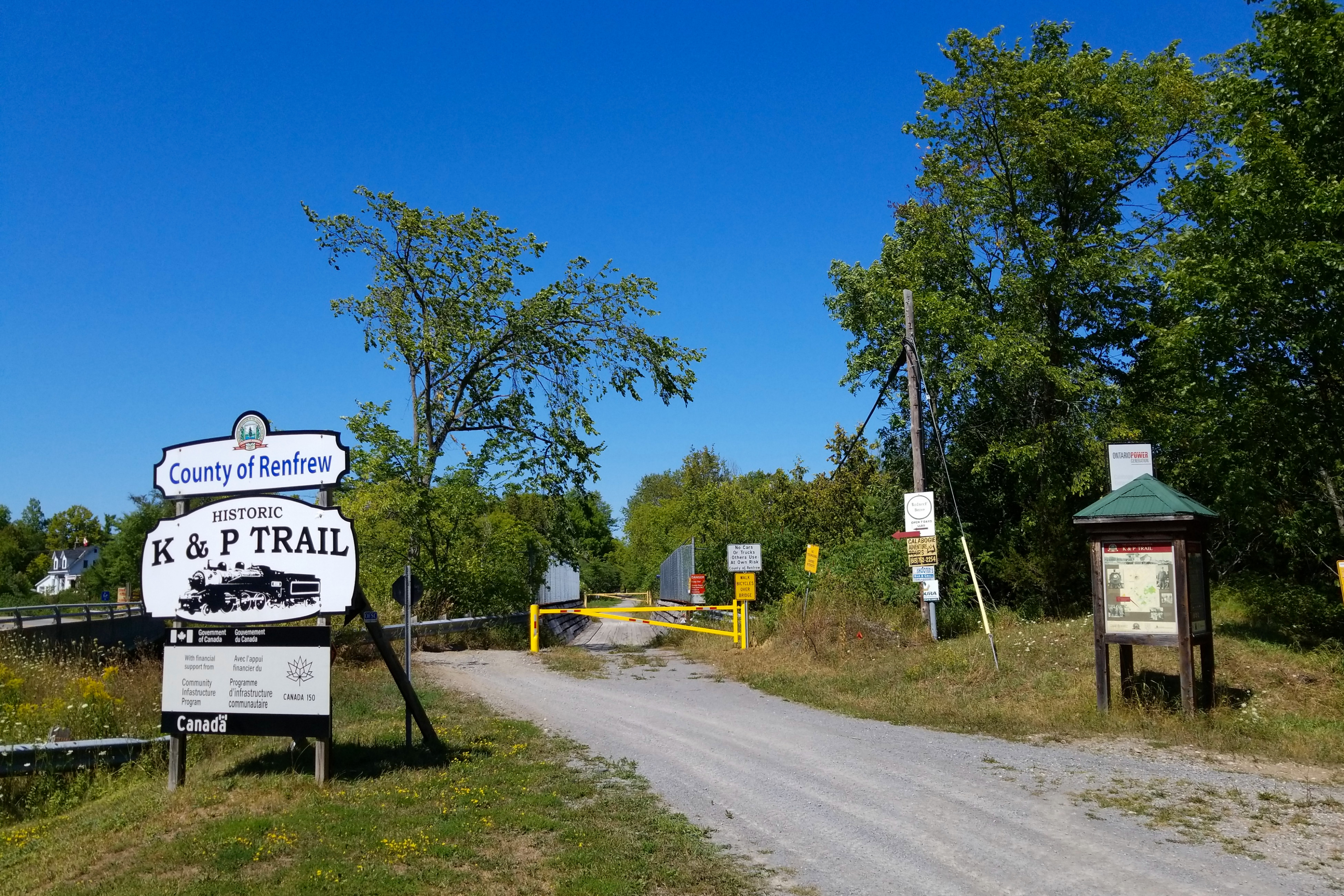 K&P Trail, Calabogie, Ontario, Canada